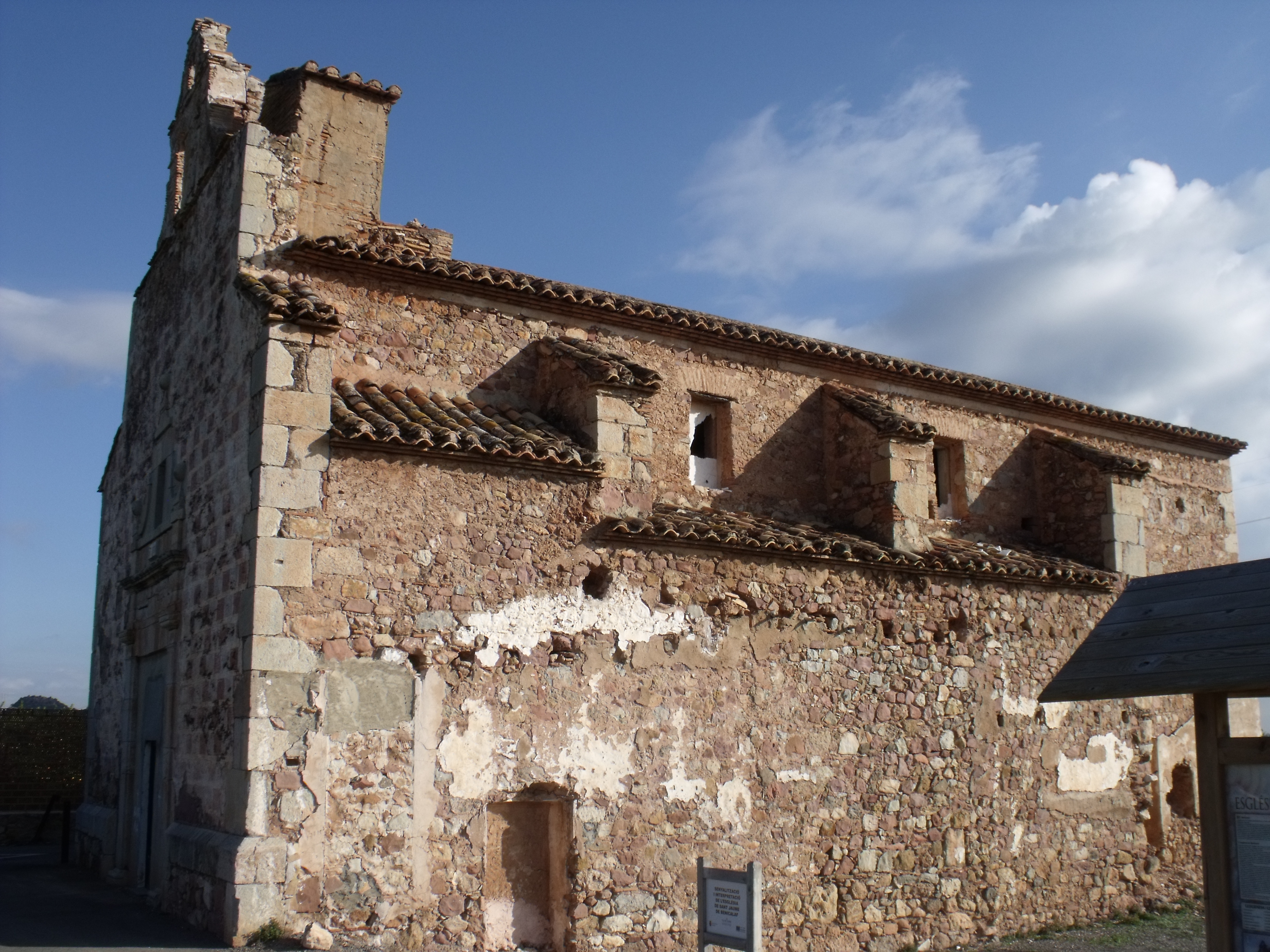 Iglesia de la antigua aldea de Benicalaf, en Benavites, España.